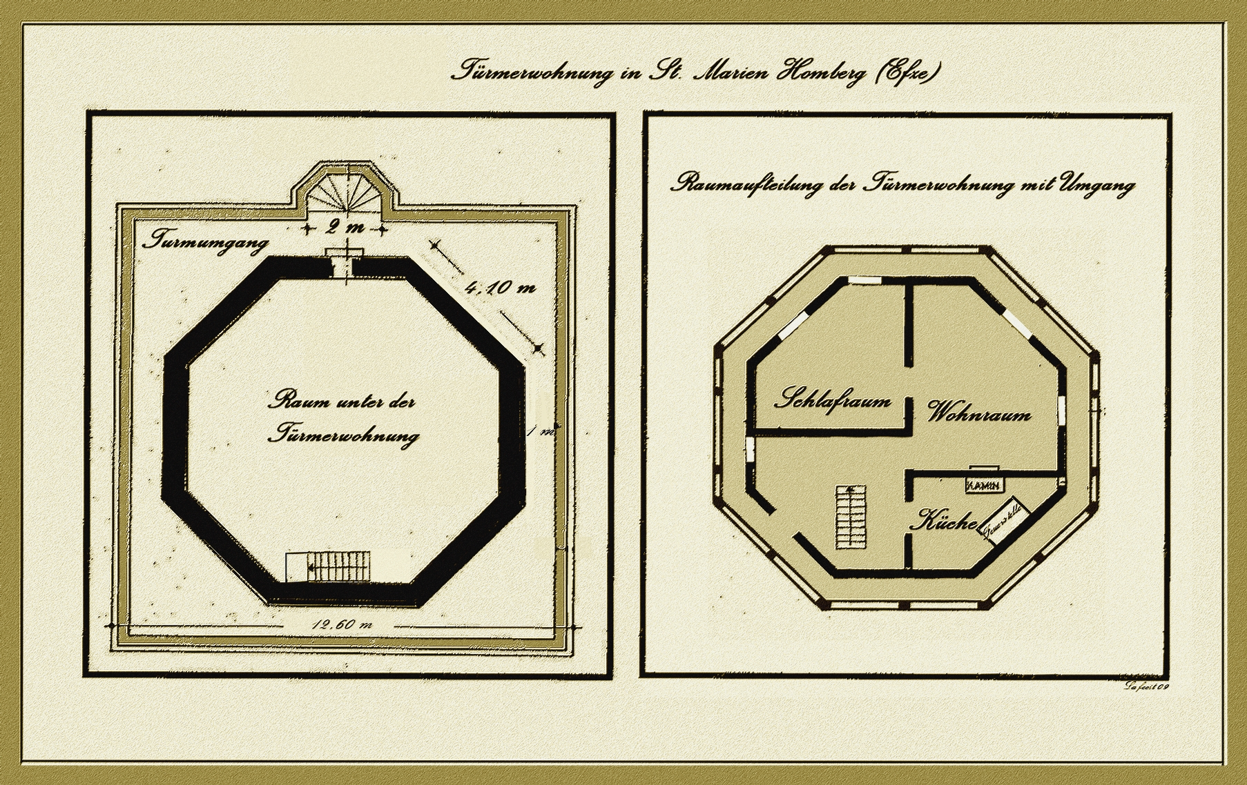 Türmerwohnung der Stadtkirche St. Marien in Homberg (Efze) im Grundriss. Gezeichnet nach verschiedenen Quellen und örtlicher Besichtigung